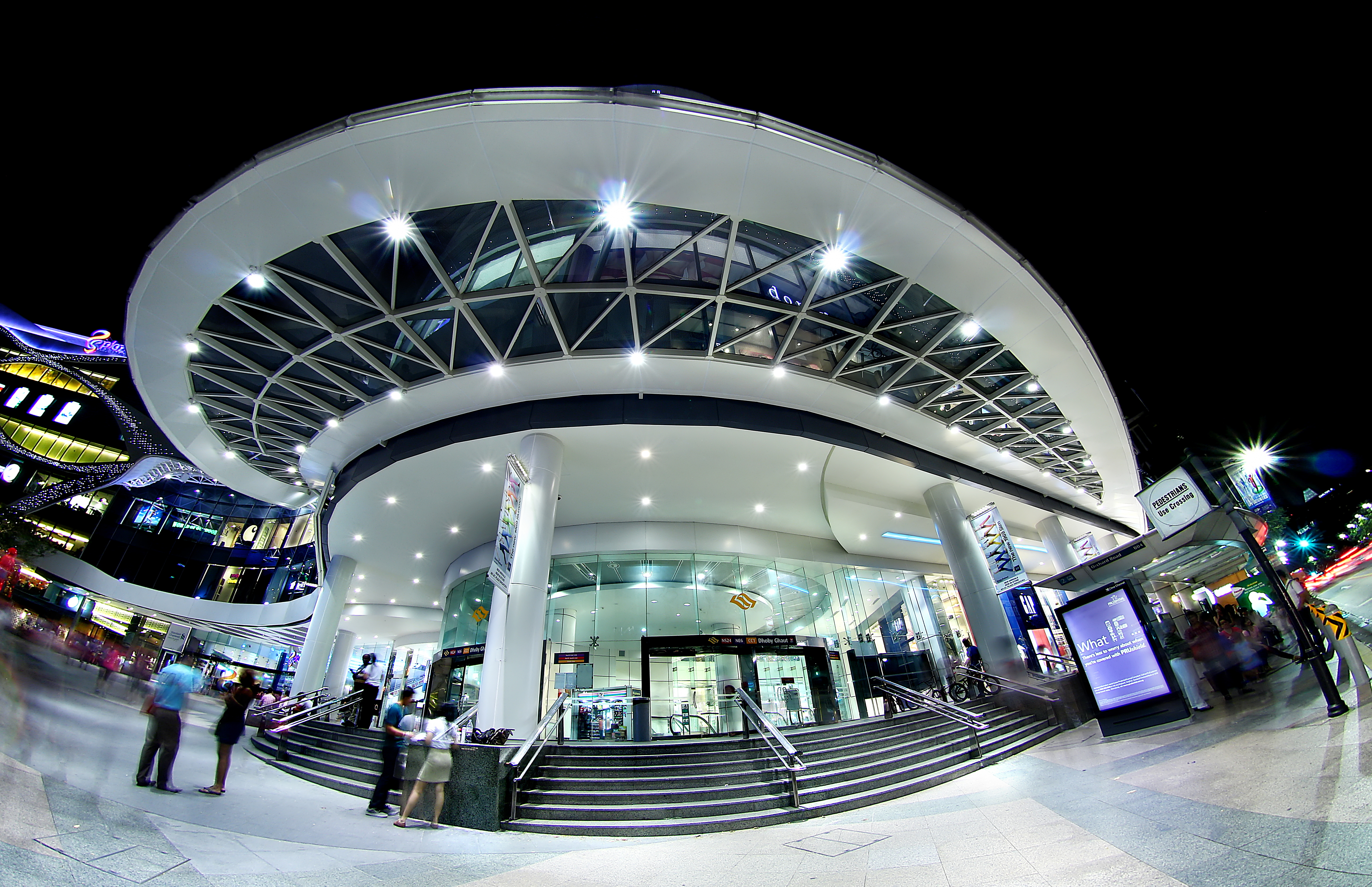 Canon 650D , Peleng FE